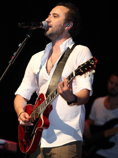 Nev